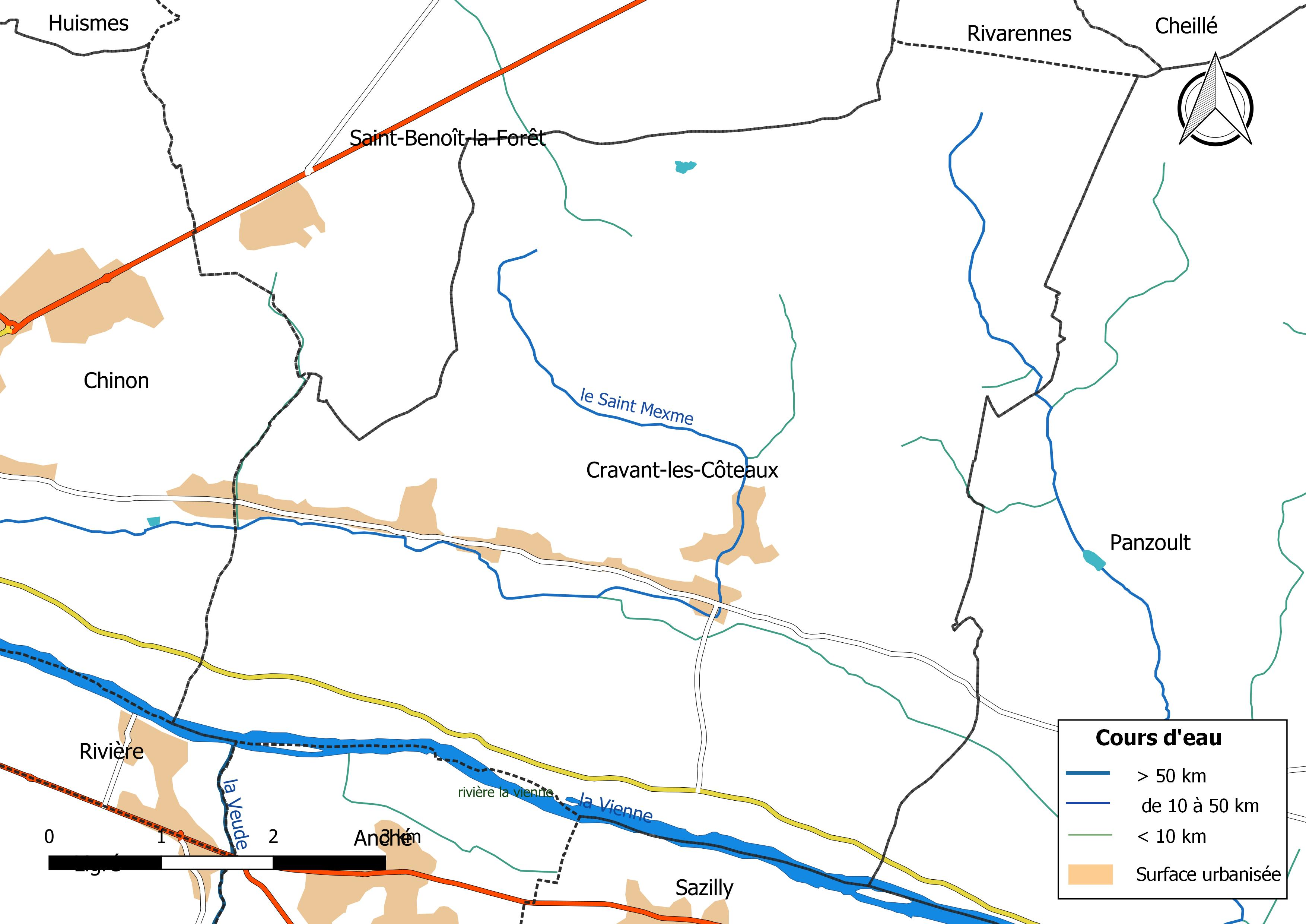 Carte du réseau hydrographique de la commune de Cravant-les-Côteaux (France).